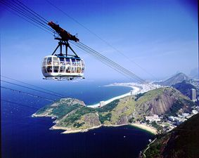 Bonde do Pão de açúcar, que parece flutuar sobre a cidade. Photo taken by Custódio Coimbra and released under the Public Domain